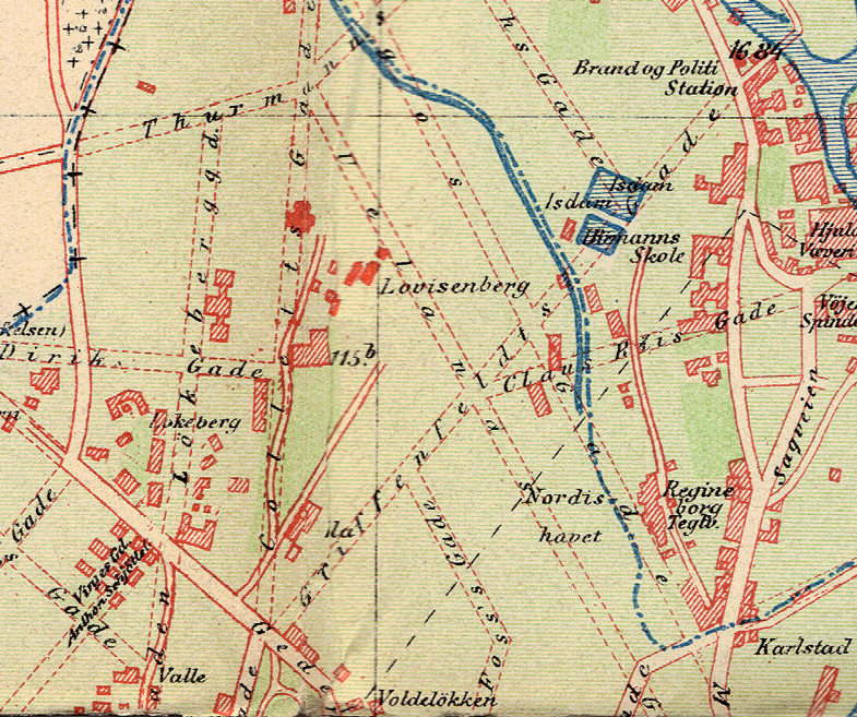 Lovisenberg, Oslo.